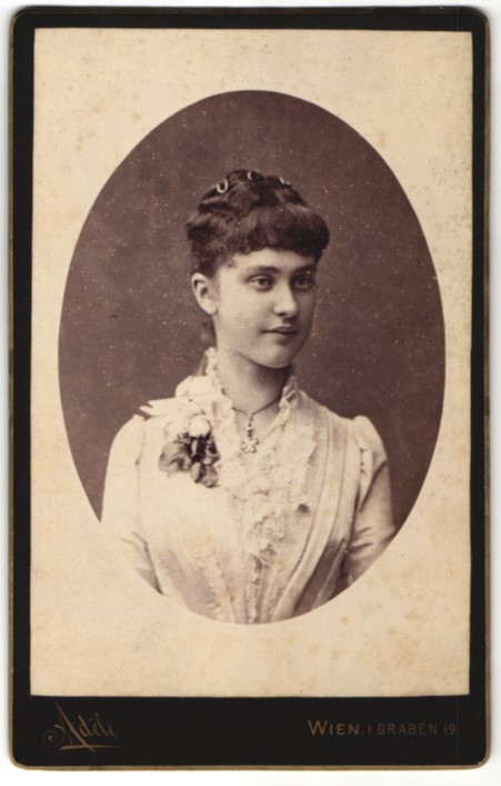 Comtesse Marie Amalia Taaffe spätere Gräfin Coudenhove